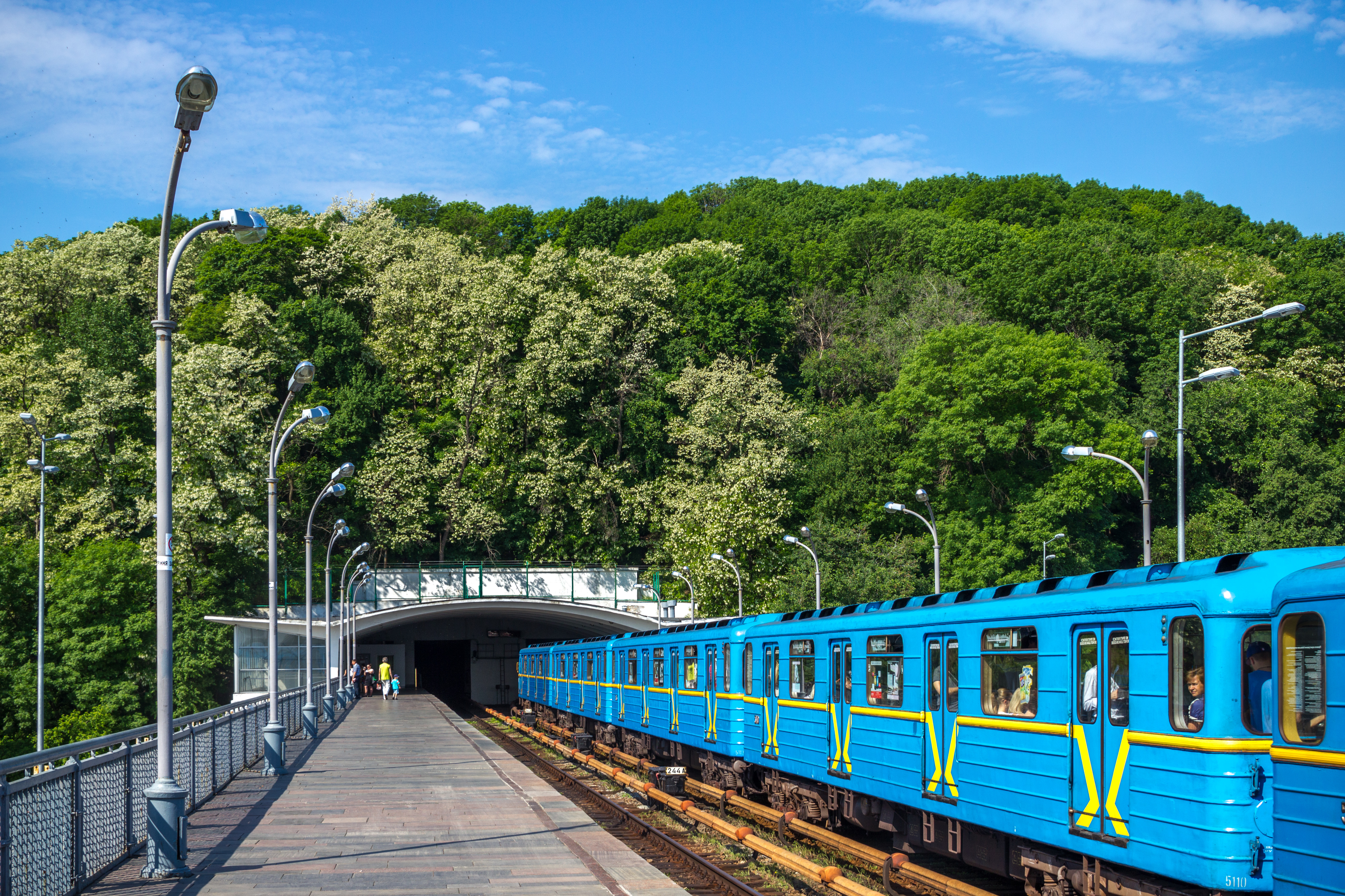 Днепр (станция метро, Киев)